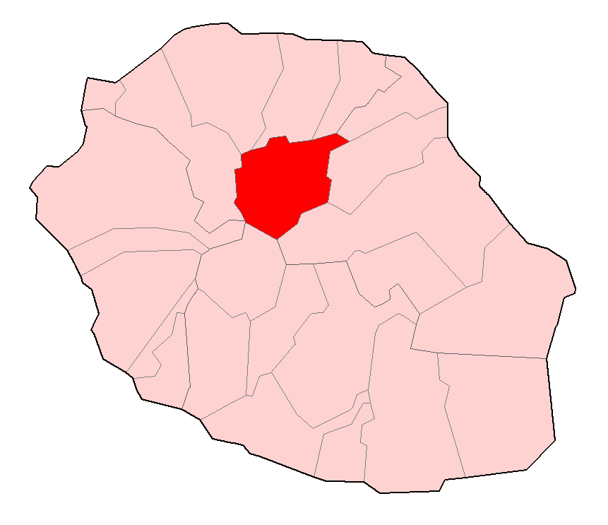 Carte de la Réunion permettant de localiser Salazie.